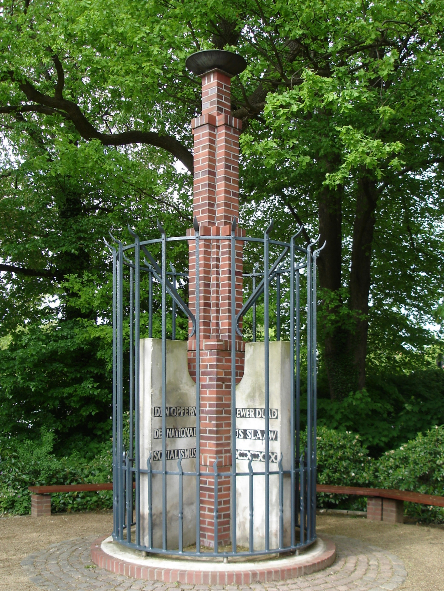 Itzehoe, Germany Denkmal für die Opfer des Nationalsozialismus Das erste Denkmal (1946) für die Opfer des Nationalsozialismus in Norddeutschland nach dem Krieg. Aufnahme am neuen Standort nach dem Wiederaufbau. Inschriften am ursprünglichen Denkmal: DEN OPFERN DES NATIONAL SOZIALISMUS LEWER DUAD ÜS SLAAW Wo das Recht ist, da wohnen von selber schon Freie. Und im mer, wo Freie sind Waltet das Recht. Ferdinand Freligrath Der Mensch ist frei geschaffen, ist frei Und wär er in Ketten geboren Schiller Nur der verdient sich Freiheit und das Leben, Der täglich sie erobern muß Goethe Und Freie seid ihr nicht geworden Wenn ihr das Recht nicht festgestellt Ludwig Uhland Es binden Sklaven fesseln nur die Hände der Sinn, er macht den Freien und den Knecht Grillparzer Echte Propheten haben manchmal falsche Pro pheten haben immer fanatische Anhänger Marie von Ebner-Eschenbach Inschrift am Ergänzungsgedenkstein: Den Verfolgten des Naziregimes zum Gedenken, die für Freiheit und Recht in Deutschland einstanden und Opfer der Tyrannei wurden.